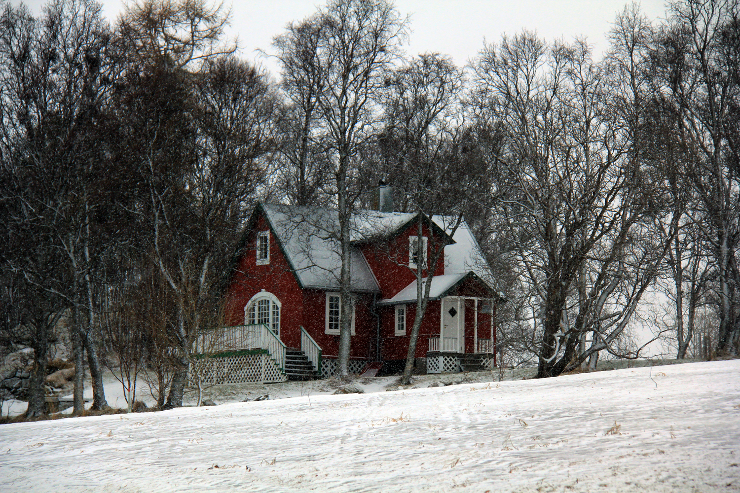 Lille Strandheim feb 2014